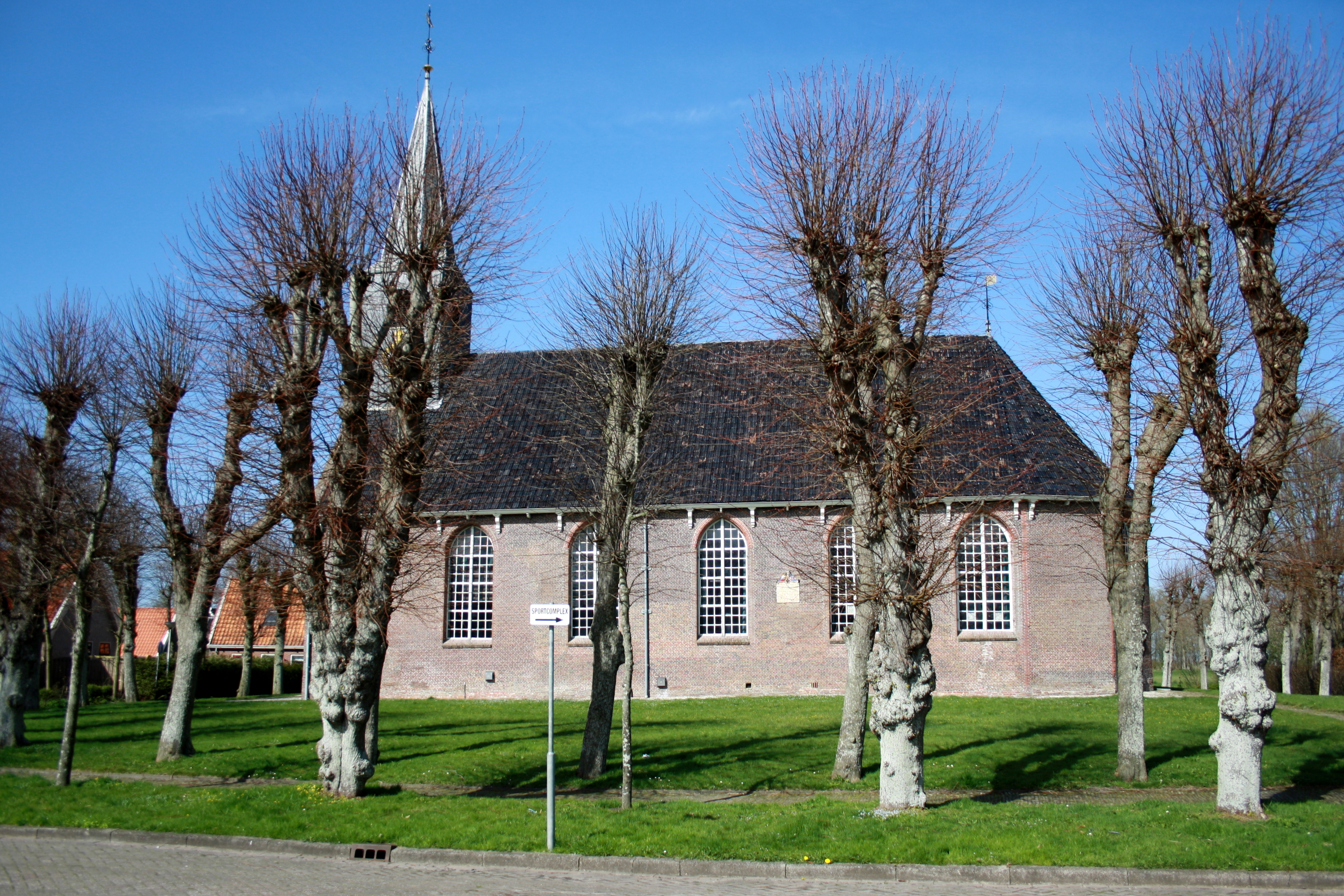 NH kerk in Vrouwenparochie (Rijksmonument 9525)